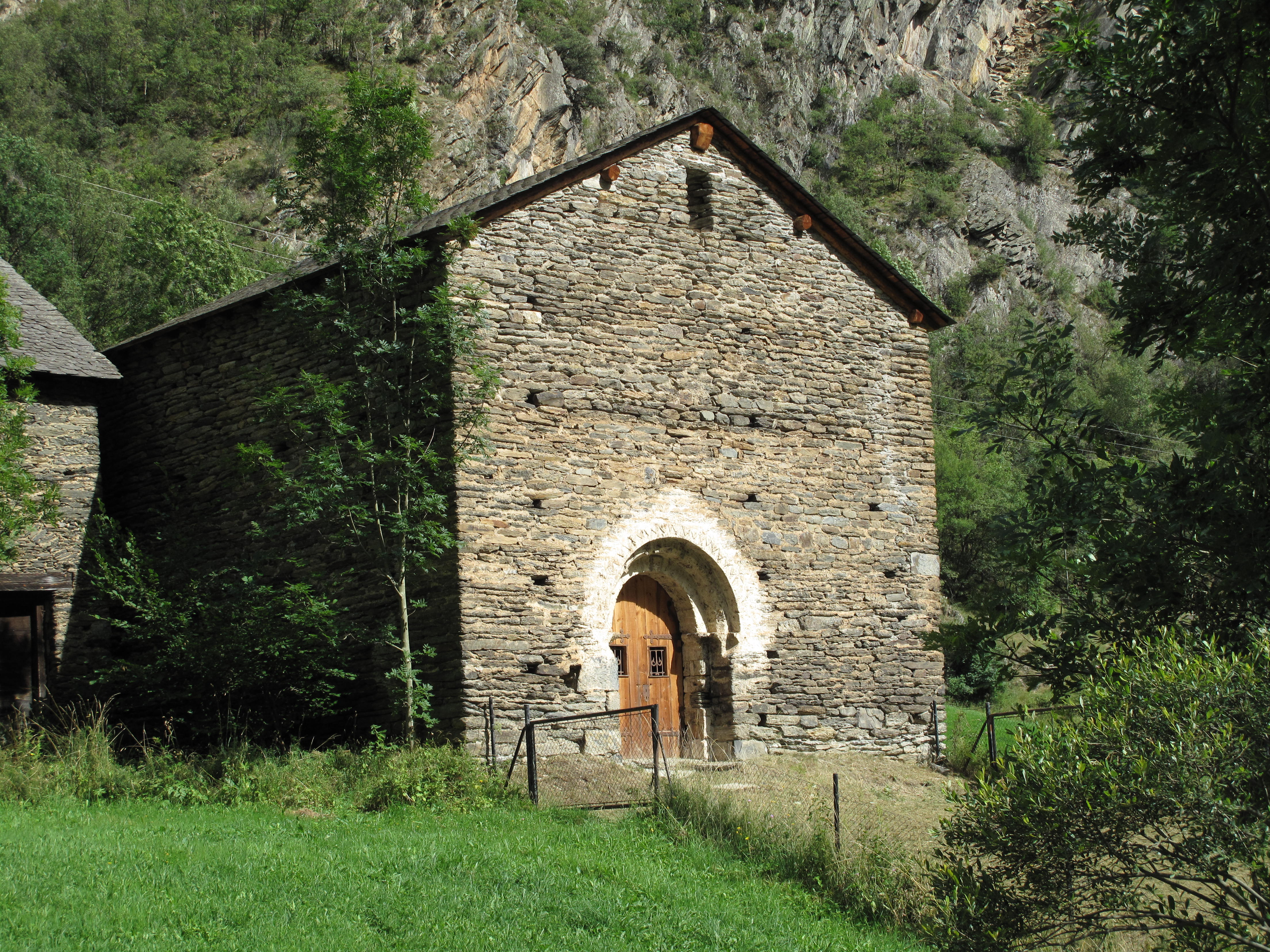 Esglesia a peu de la carretera de la Vall Ferrera